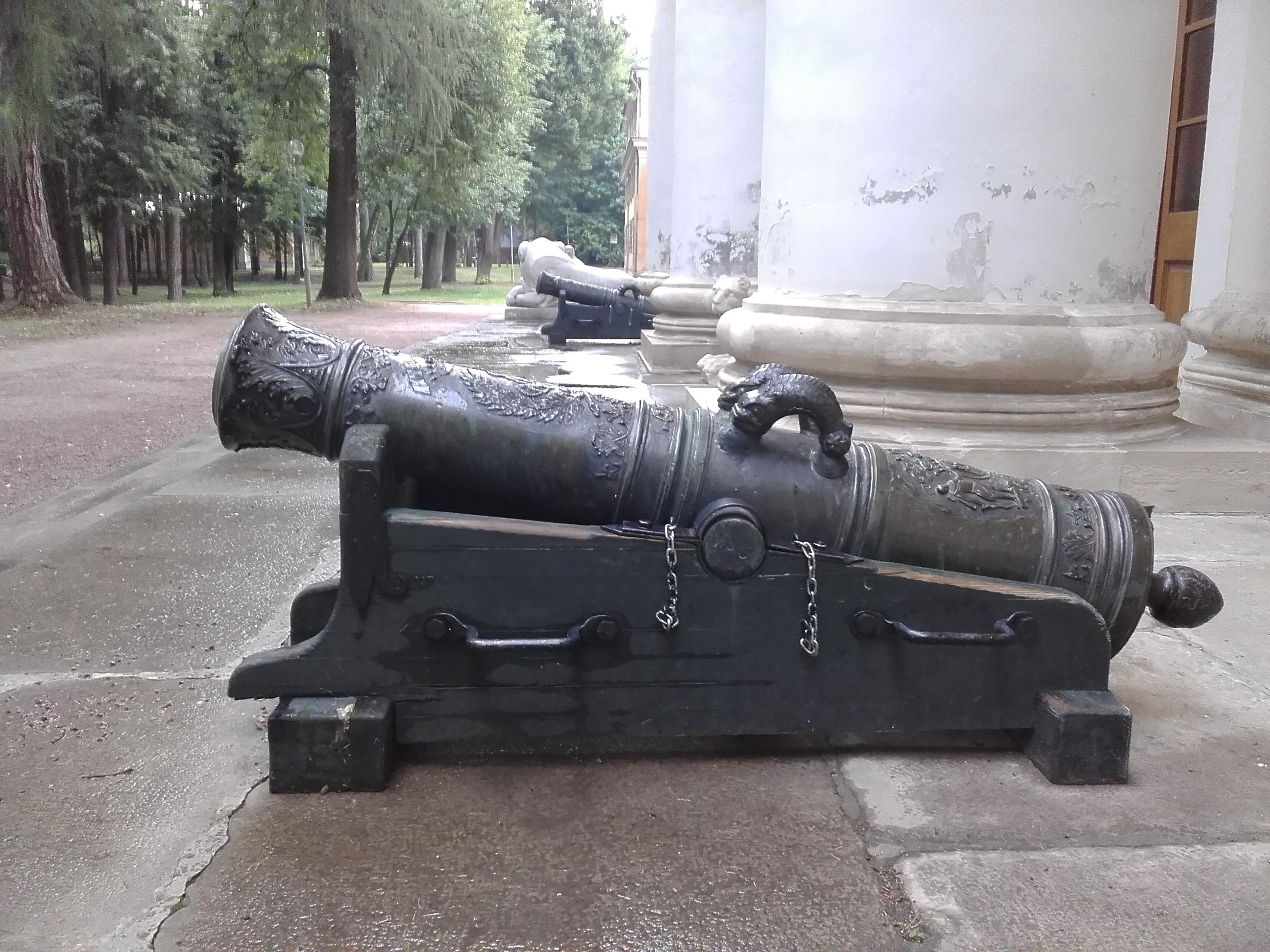 Морская пушка на подиуме Дворца